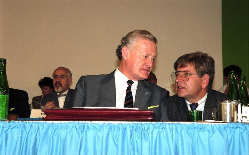 17.-18.11.1989 53. CSU-Parteitag in der Münchener Bayernhalle mit dem CSU-Vorsitzenden, Bundesminister der Finanzen, Dr. Theodor Waigel, dem Bayerischen Ministerpräsident Max Streibel, Bundesminister Hans Klein, und als Gast Bundeskanzler Helmut Kohl.